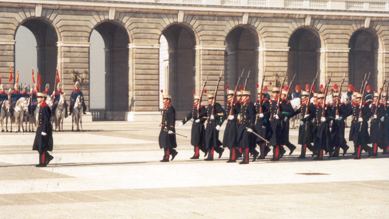 Relevo Solemne de la Guardia Real, en el Palacio Real de Madrid